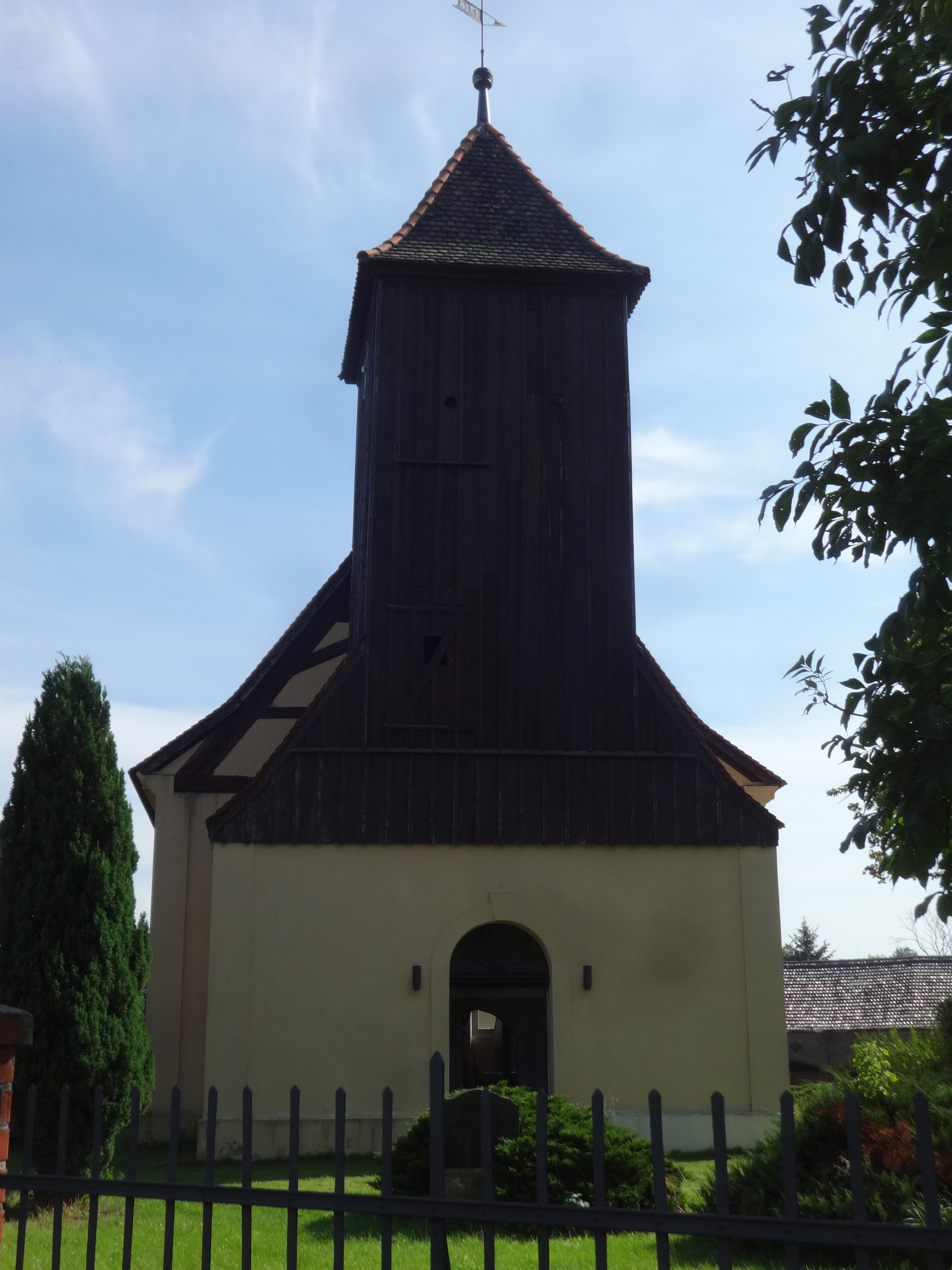 Die Dorfkirche Löwenbruch ist eine Saalkirche aus dem Jahr 1716 in der Stadt Ludwigsfelde im Landkreis Teltow-Fläming im Land Brandenburg. Im Innern stehen unter anderem ein Kanzelaltar aus dem Jahr 1719 sowie eine Taufe aus dem Jahr 1670.